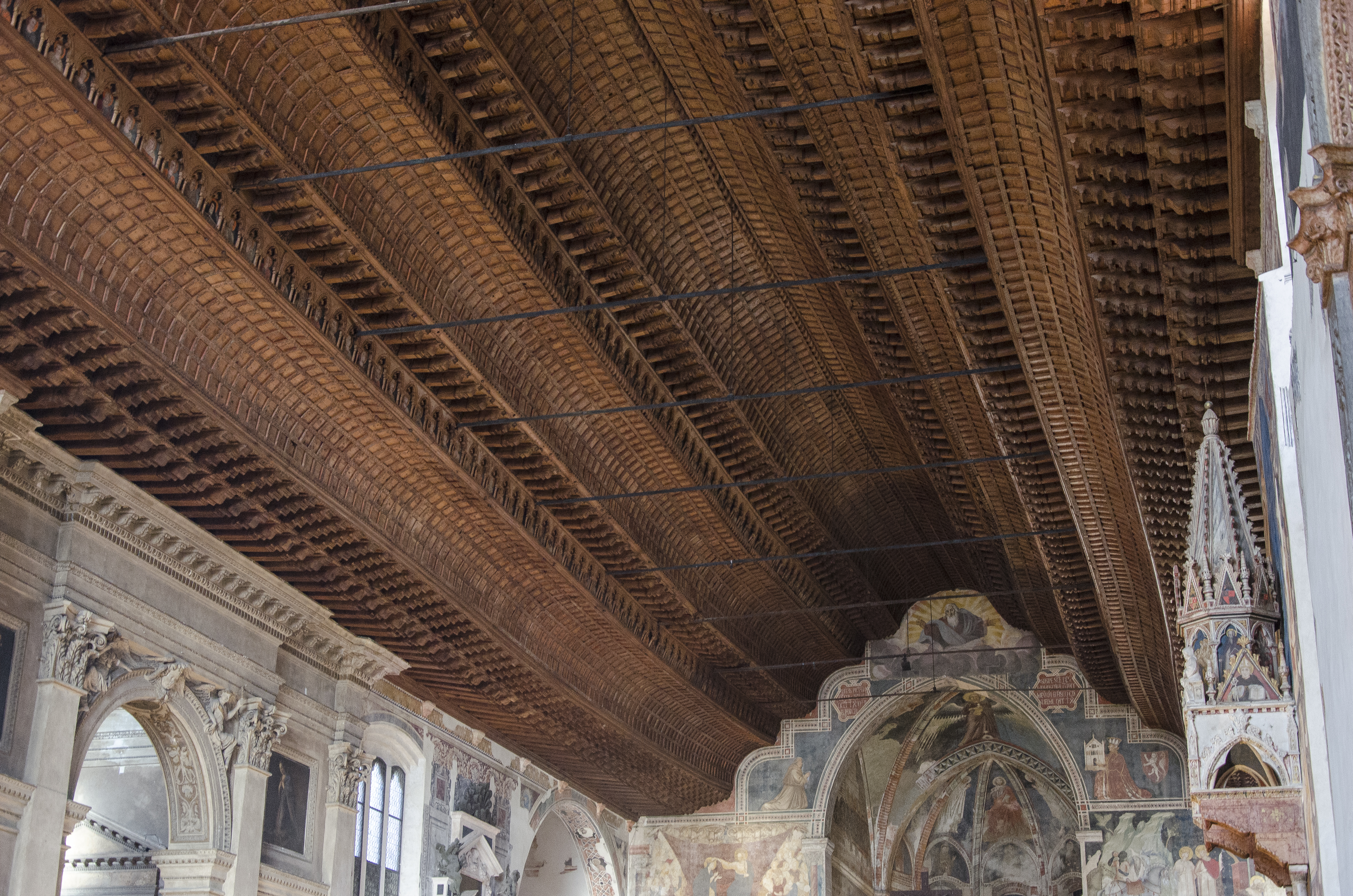 Fotografia della chiesa superiore